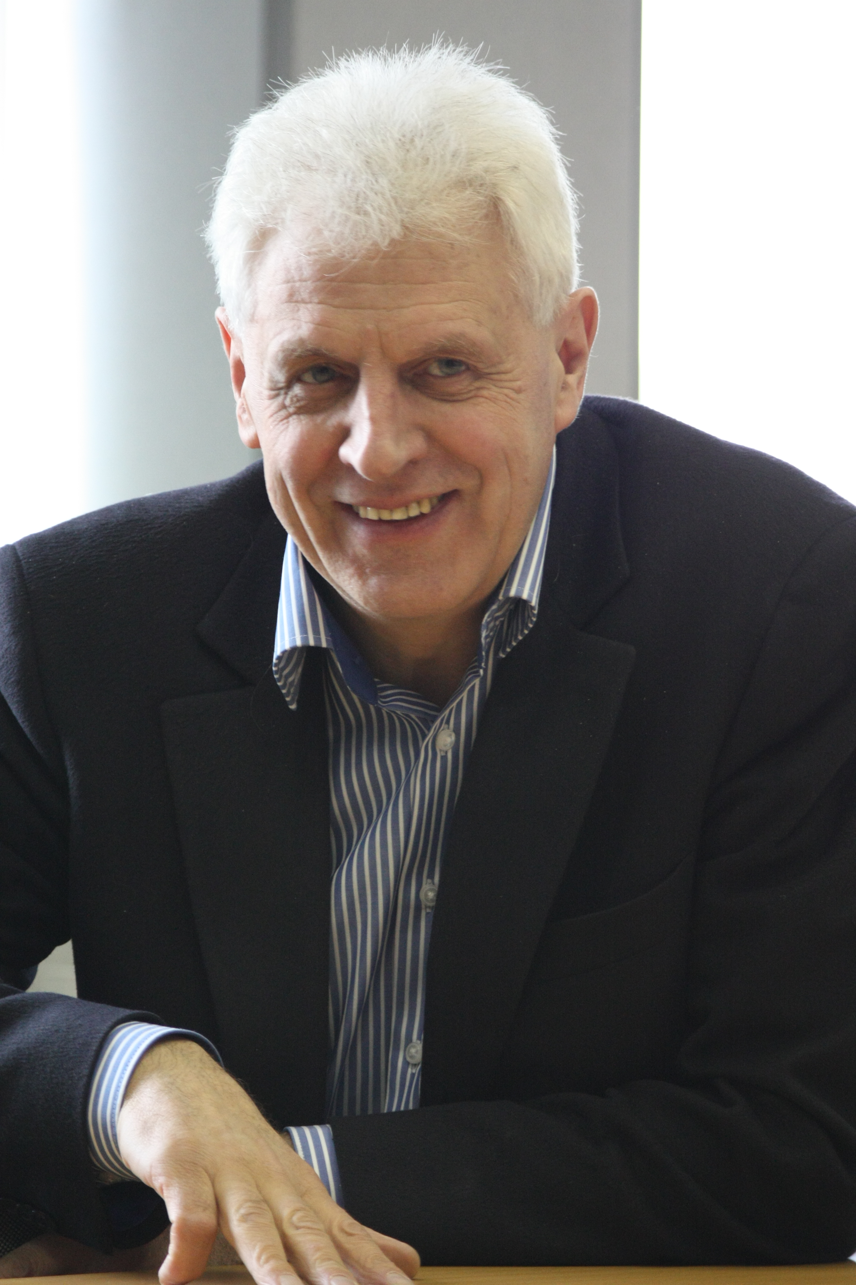 Карлин Лев Николаевич